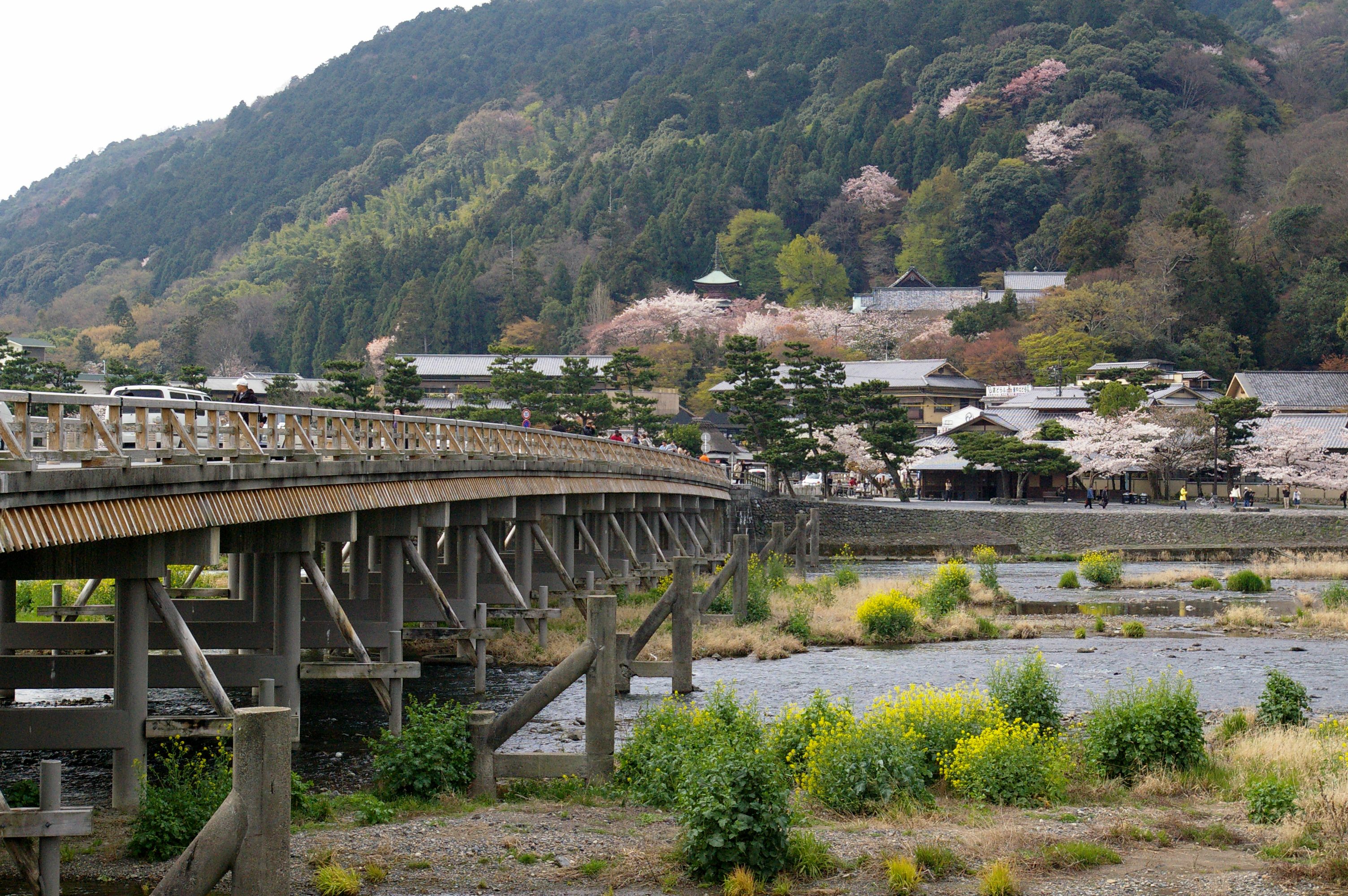 Arashiyama_Togetsukyo-bridge, Kyoto